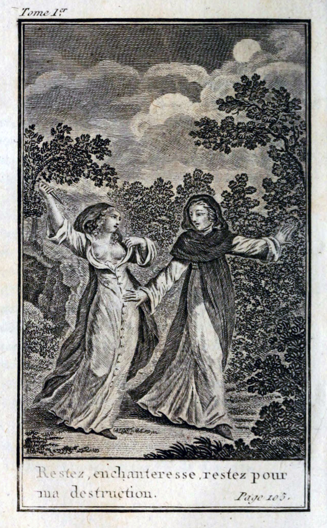 frontispice du tome 1 du livre le Moine traduit de l'anglais, de Matthew Gregory Lewis, Maradan, 1811 en 4 tomes